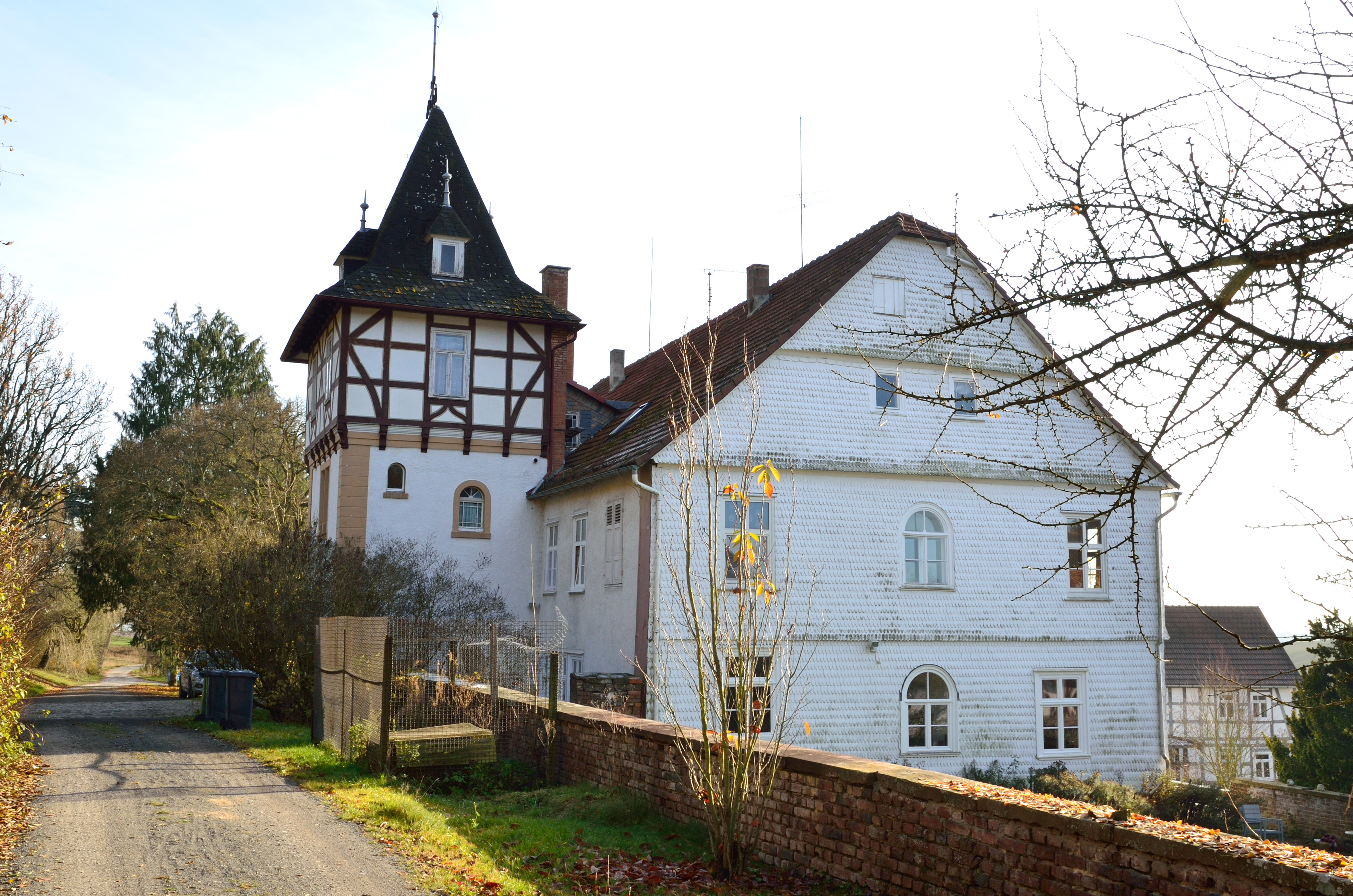 Ein Wohnhaus des zu Oberweimar (Hessen) gehörigen Ritterguts Germershausen